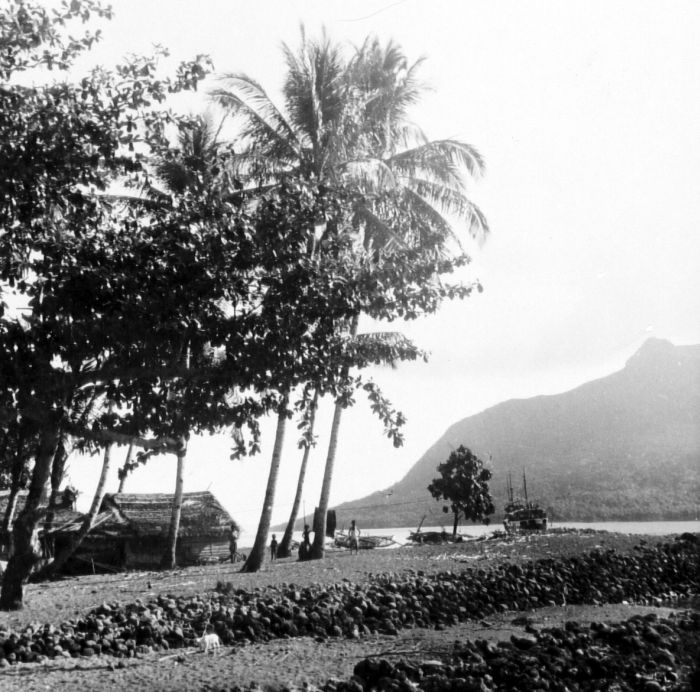 Repronegatief. Hut langs een baai op Poelau Tahoelandang